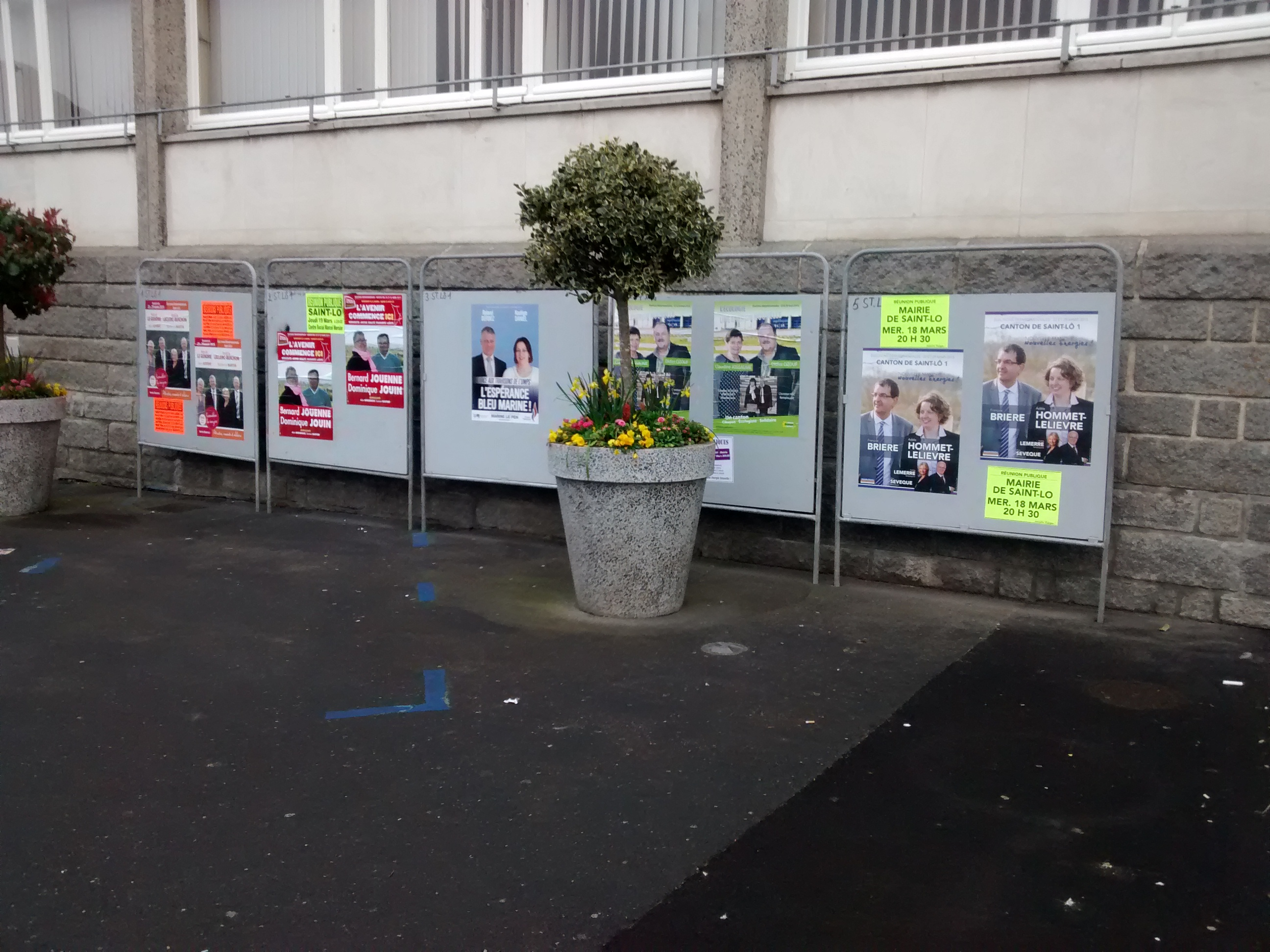 Élections départementales au bureau de vote de l'Hôtel de ville